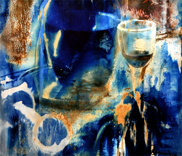 Chemogramm Titel: Gustav I, 1976, Autor Josef H. Neumann